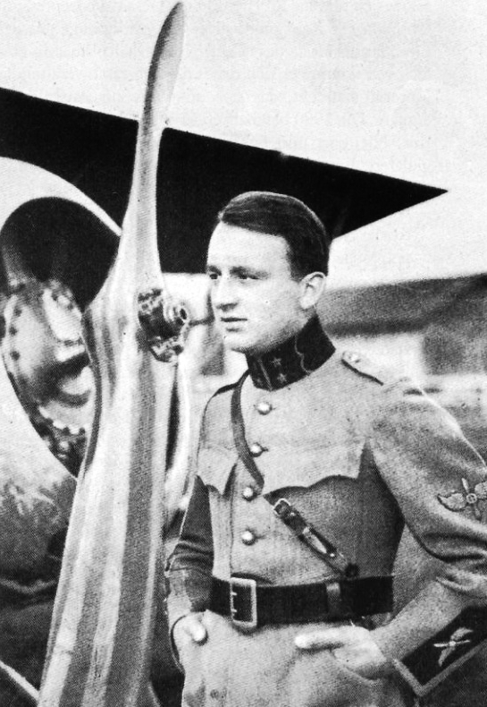 Max Cartier (1896–1928) Oberstleutnant, Flugpionier,Testpilot